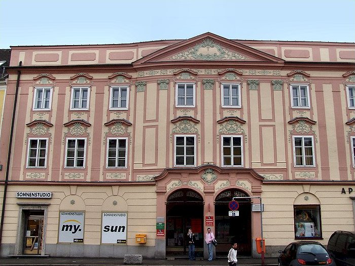 Stiftstaverne